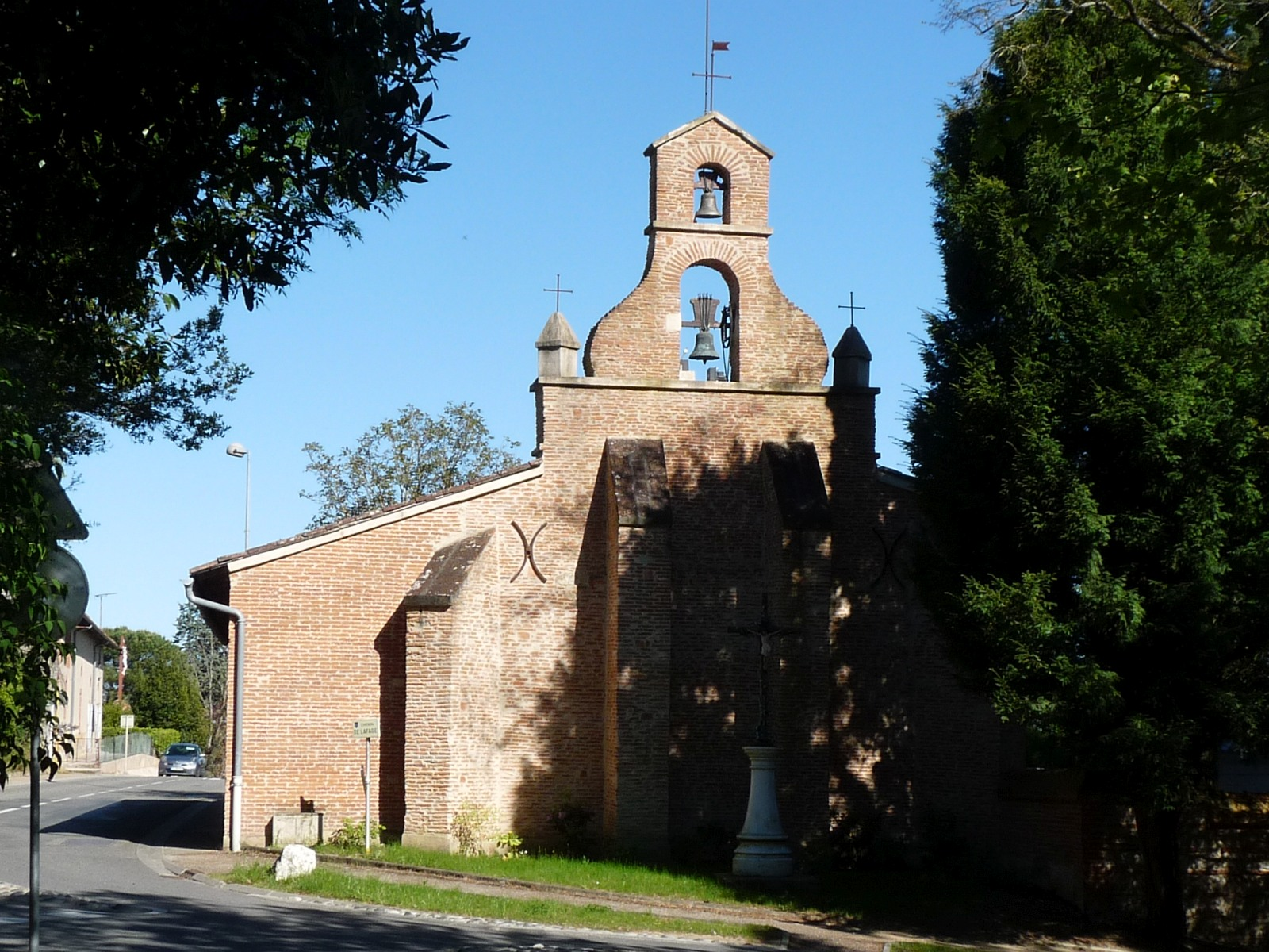 Eglise d'Aigrefeuille, Haute-Garonne, France